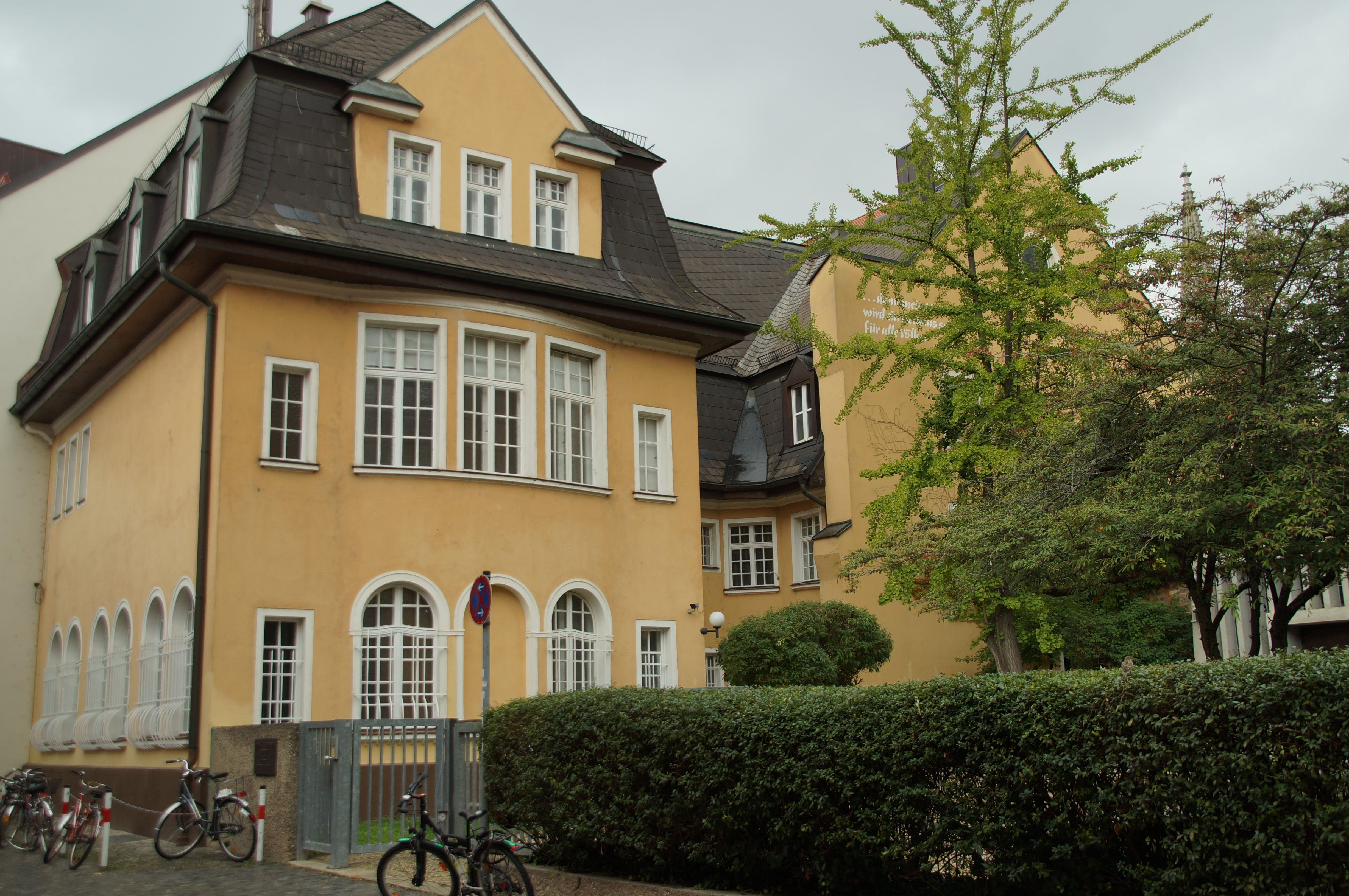 Jüdisches Gemeindehaus, zweigeschossiger Mansardwalmdachbau mit Eckflügeln, in Formen des barockisierenden Jugendstils, 1911/12 von Joseph Koch und Franz SpiegelThis is a photograph of an architectural monument.